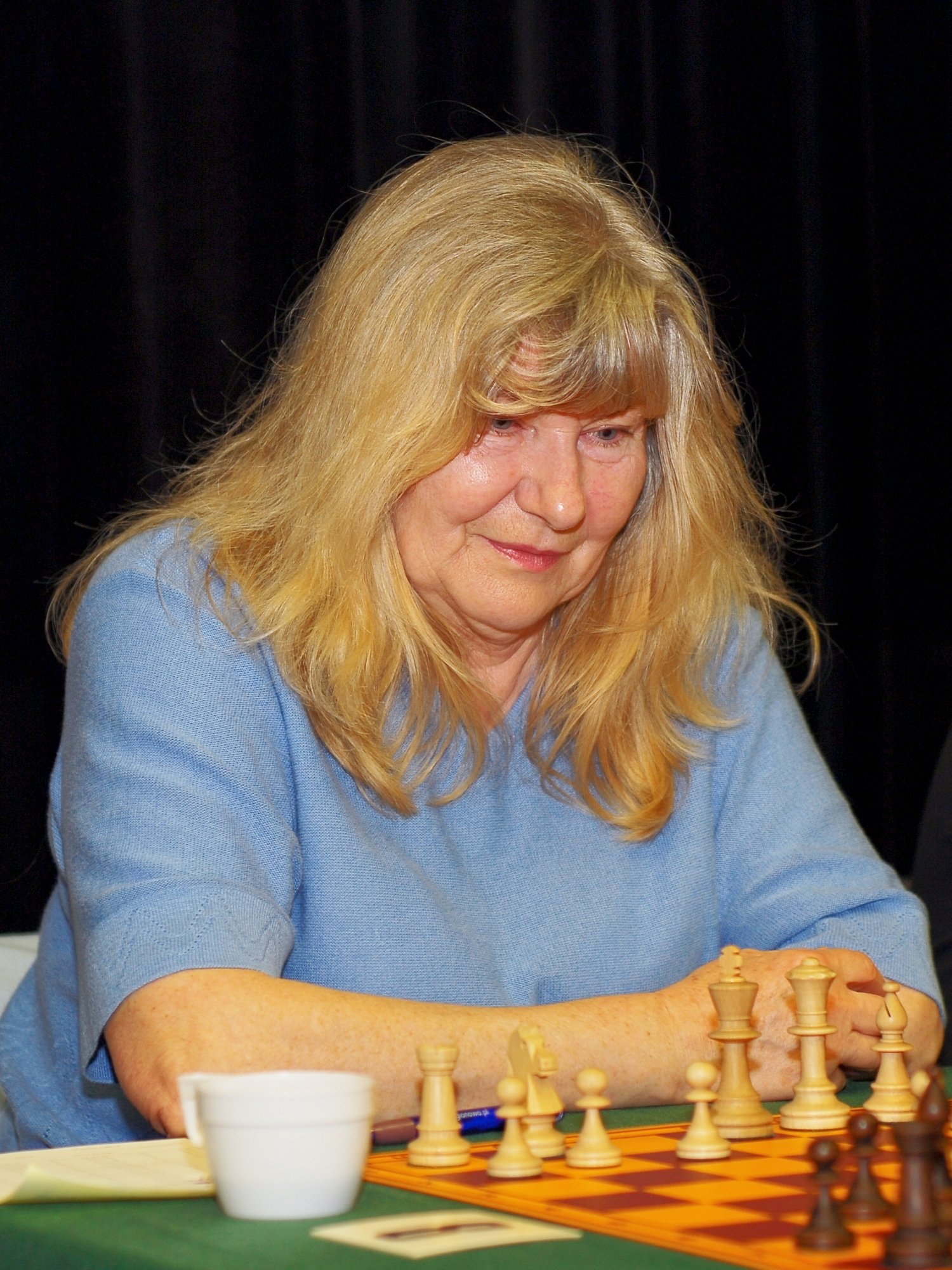 WFM Elżbieta Kowalska, Mistrzostwa Warszawy 2013.